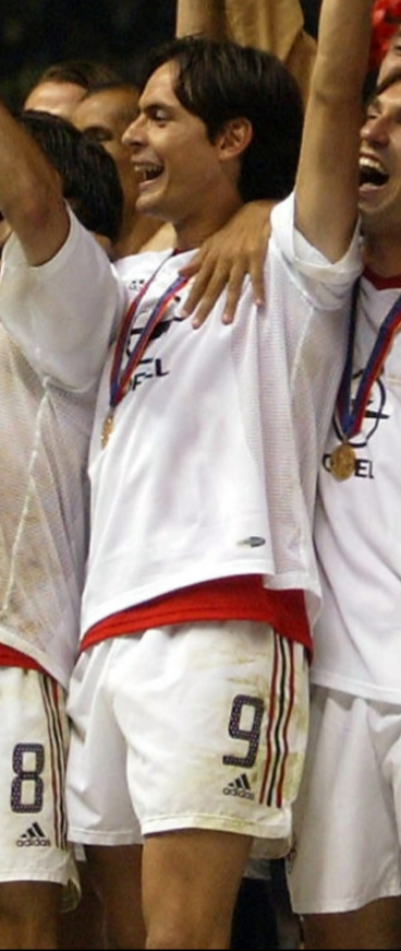 Inzaghi con la maglia rossonera dopo la vittotia della UEFA Champions League 2002-2003 a discapito della Juventus